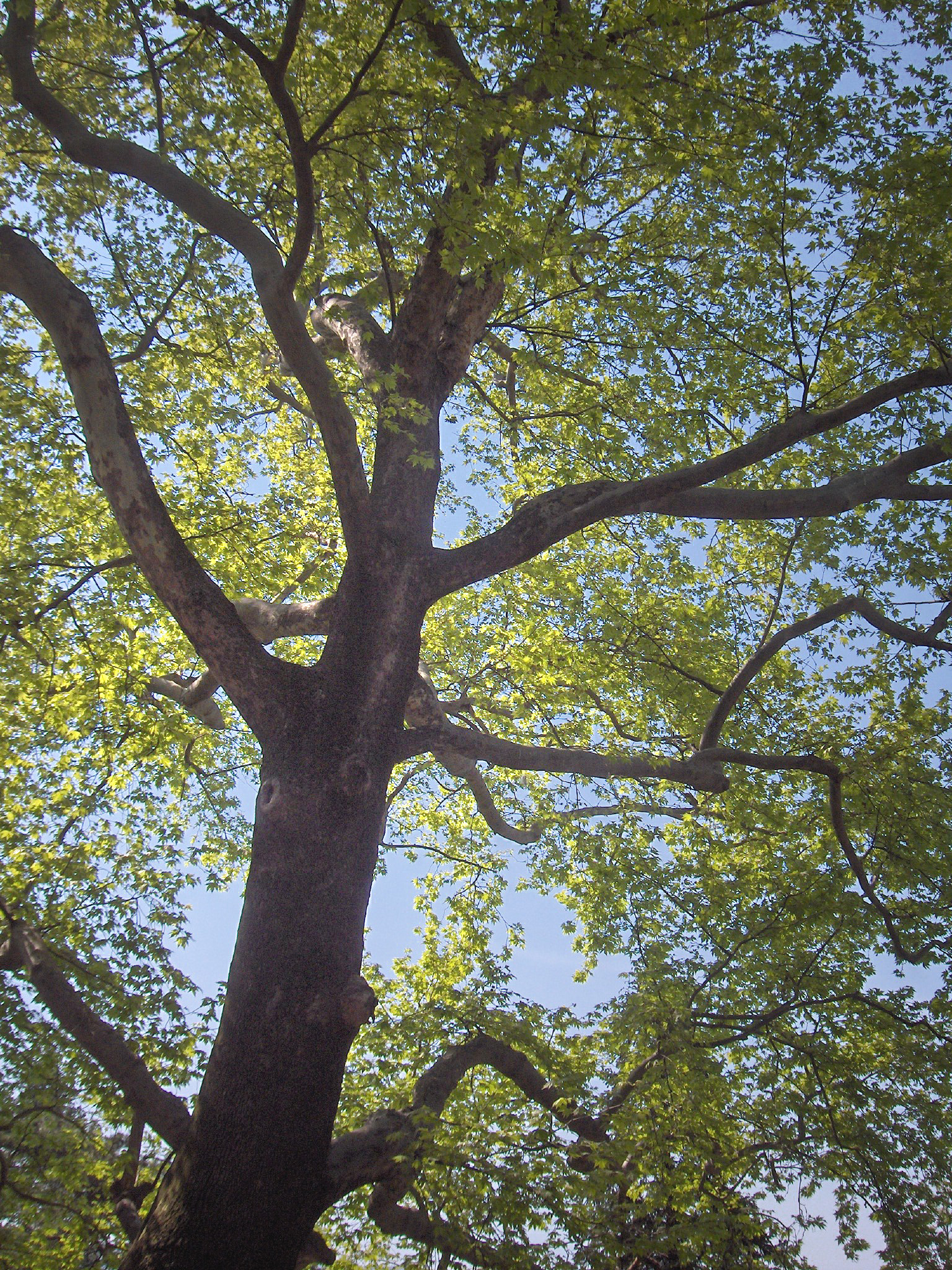 Platanus orientalis; Bursa, Turkey